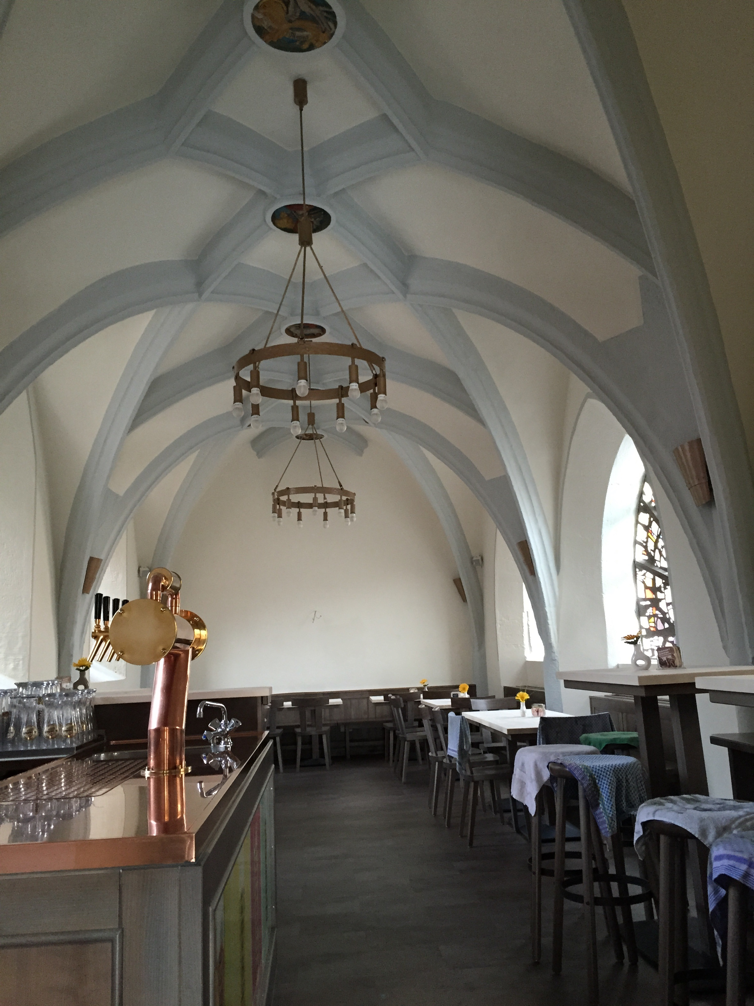 EG der Kapelle